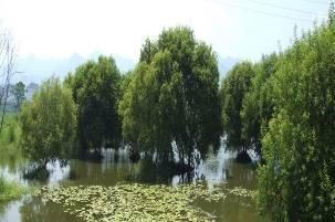 臺北縣樹林市鹿角溪人工溼地。